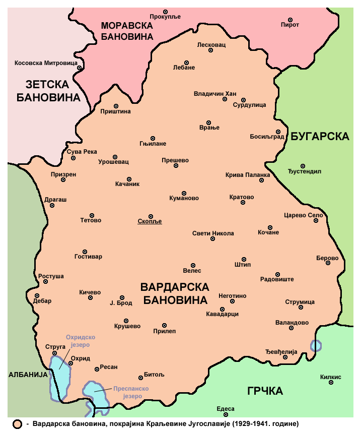 Map of the Vardar Banovina province of the Kingdom of Yugoslavia (1929-1941).Мапа Вардарске бановине, покрајине Краљевине Југославије (1929-1941).